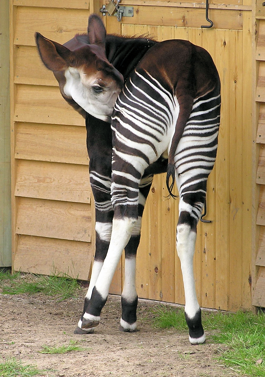 Okapi Okapia johnstoni at Bristol Zoo, England.